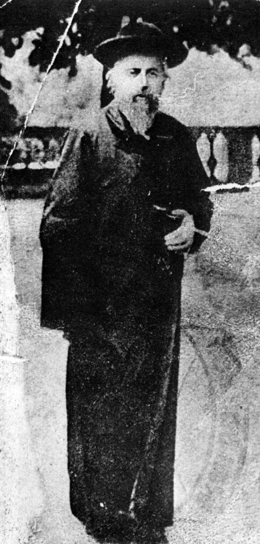 צבי הירש שפירא מקור